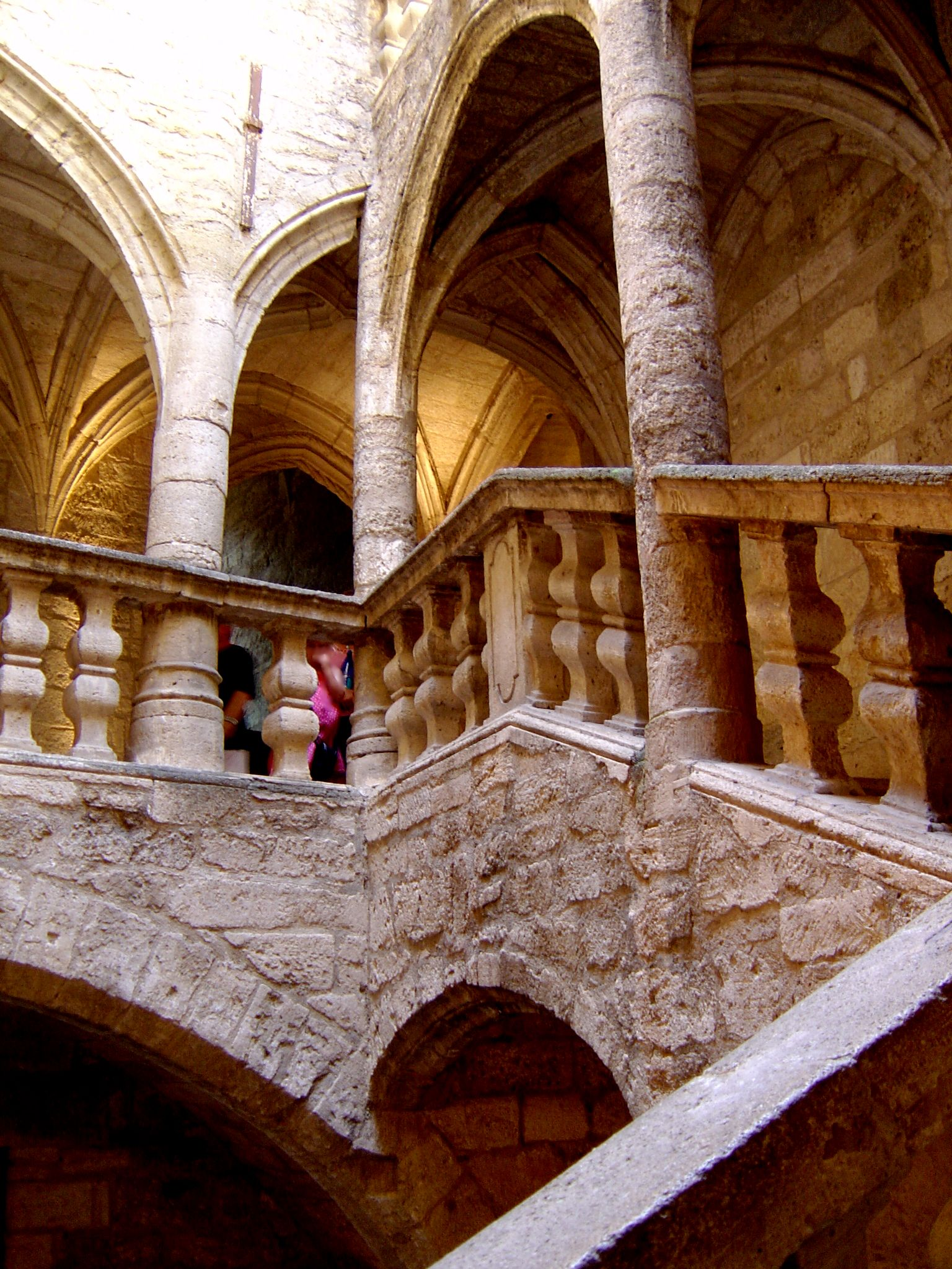 Hôtel Lacoste à Pézenas (Hérault) (FRANCE) Hier hat Ludwig XIV während seines Aufenthaltes in Pézenas übernachtet I took this photo in july 2006